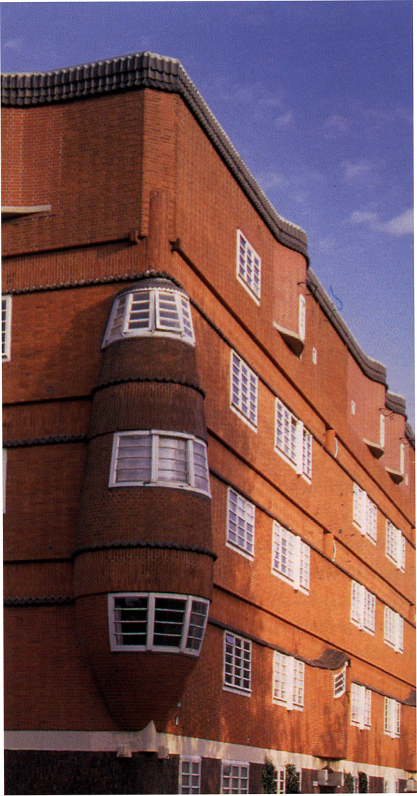 Amsterdamse School van M. de Klerk in Spaarndammer buurt